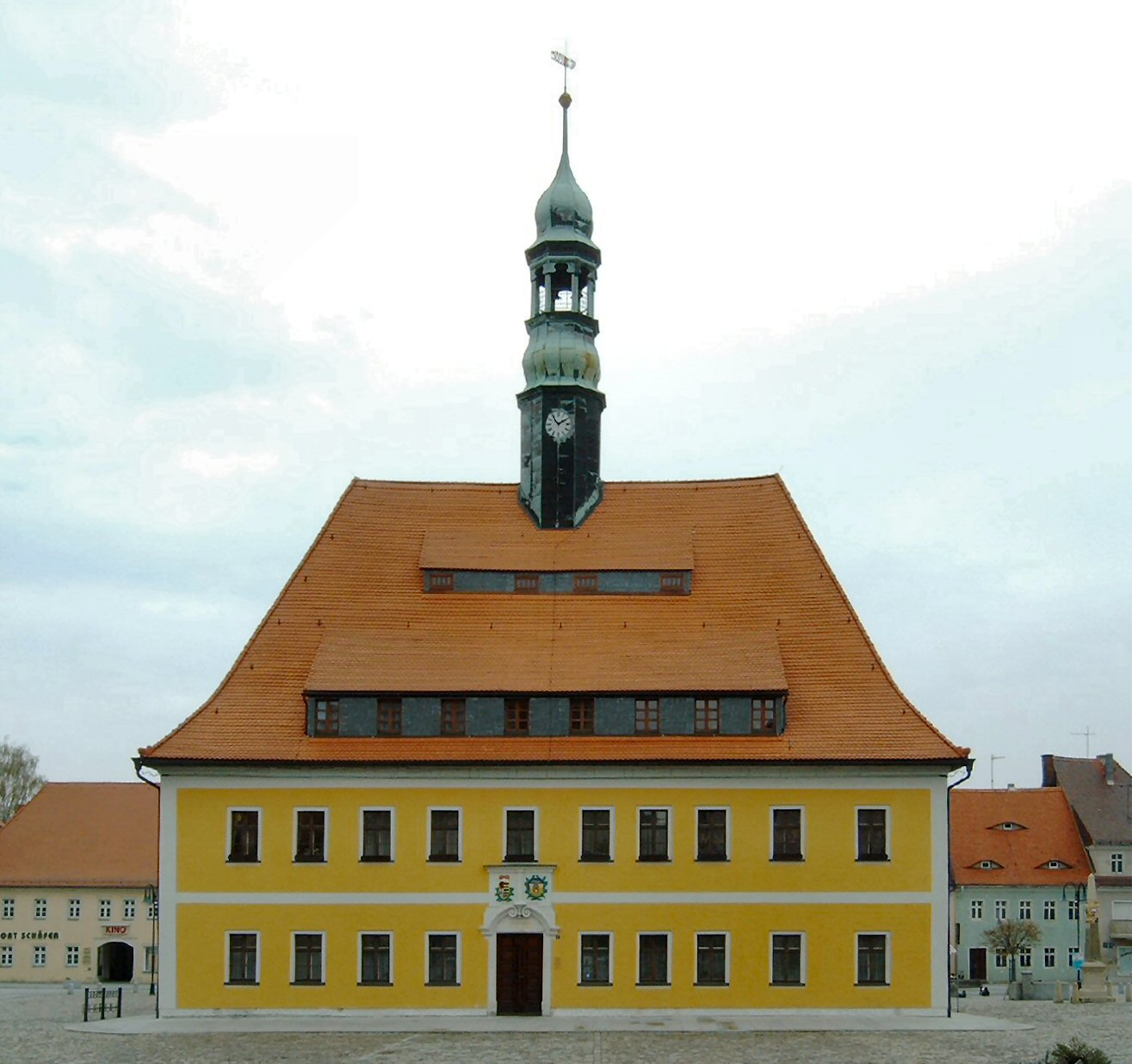 Rathaus Neustadt in Sachsen. Fotografiert am 17.4.05 von Schmidti: GNU-FDL